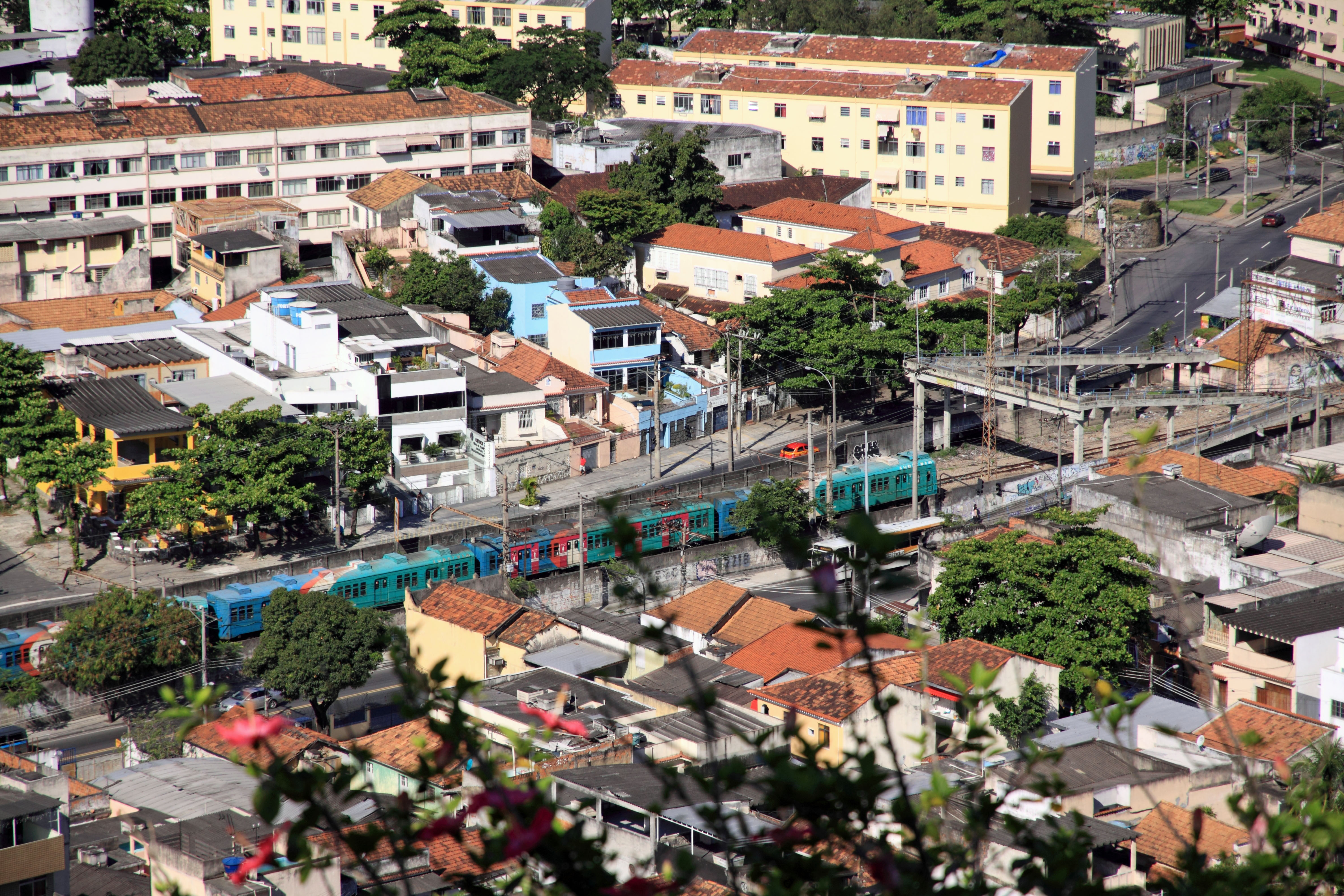 Trem da Supervia circulando entre a Penha e Olaria visto da Igreja da Penha.